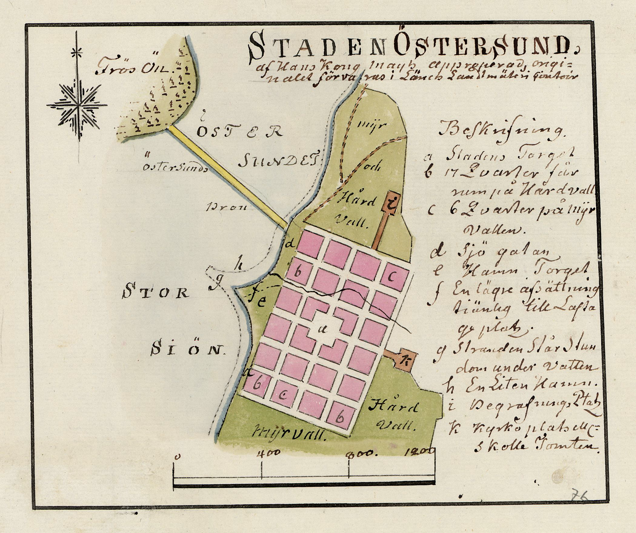 Karta över Östersund från ca: år 1800 av Fredrik Adolf Wiblingen.